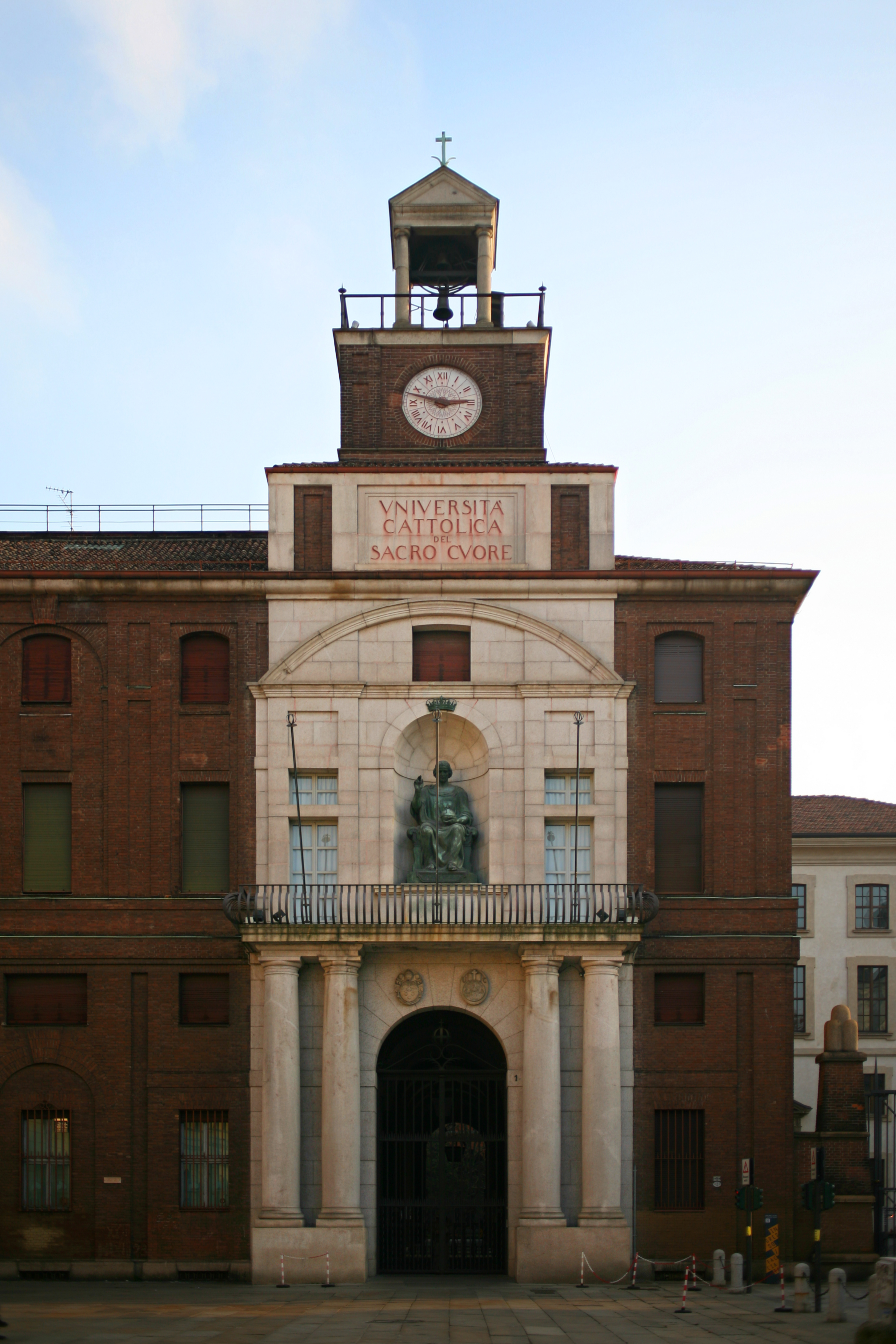 Università Cattolica del Sacro Cuore di Milano (facciata di Giovanni Muzio); nella nicchia sopra alla balconata la statua del Cristo Re di Giannino Castiglioni (1929)